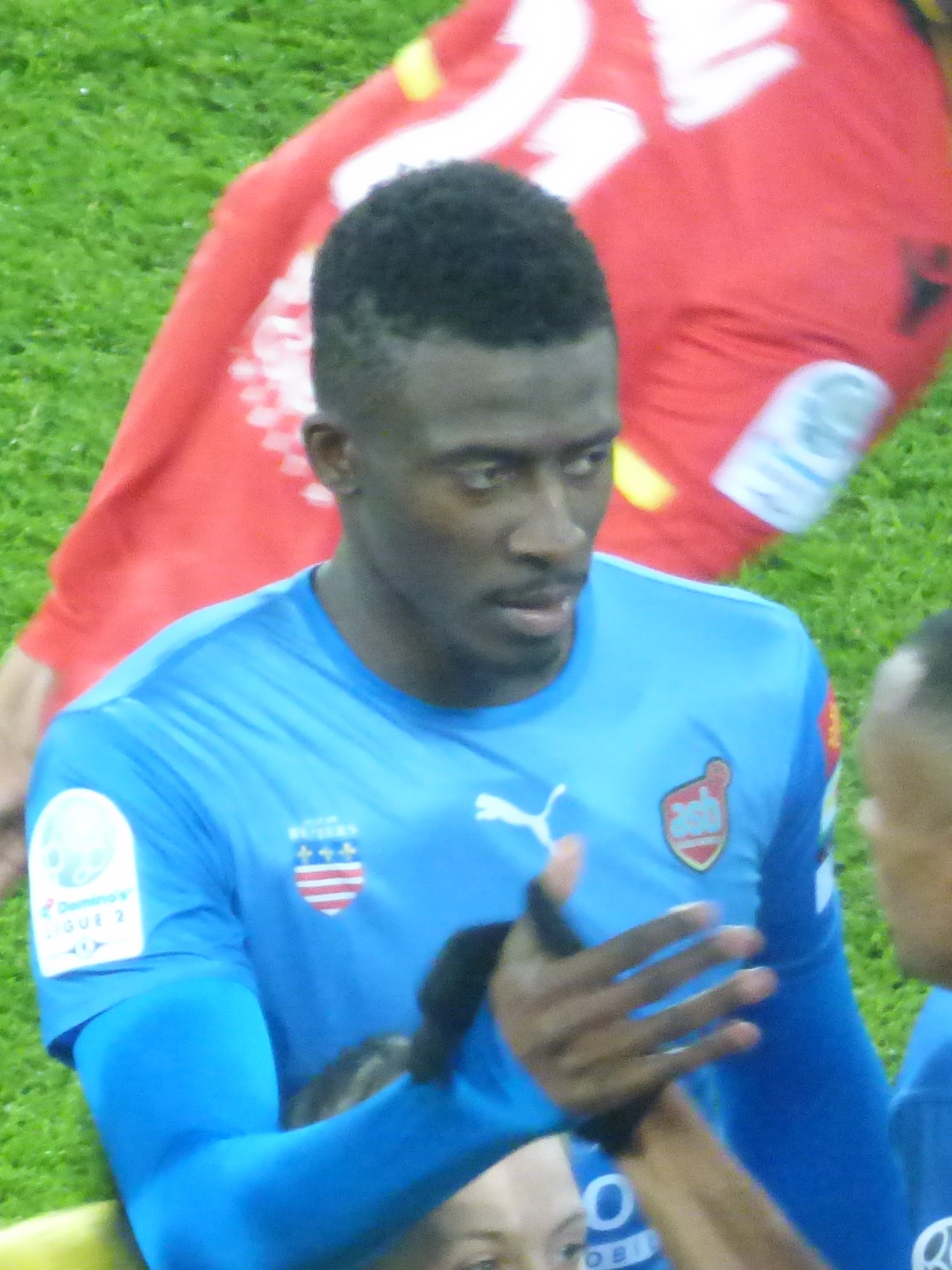 Aboubakary Kanté avant le match RC Lens / AS Béziers, comptant pour la 23ème journée du championnat de France de football de Ligue 2 2018-2019, le 4 février 2019, au Stade Bollaert-Delelis.